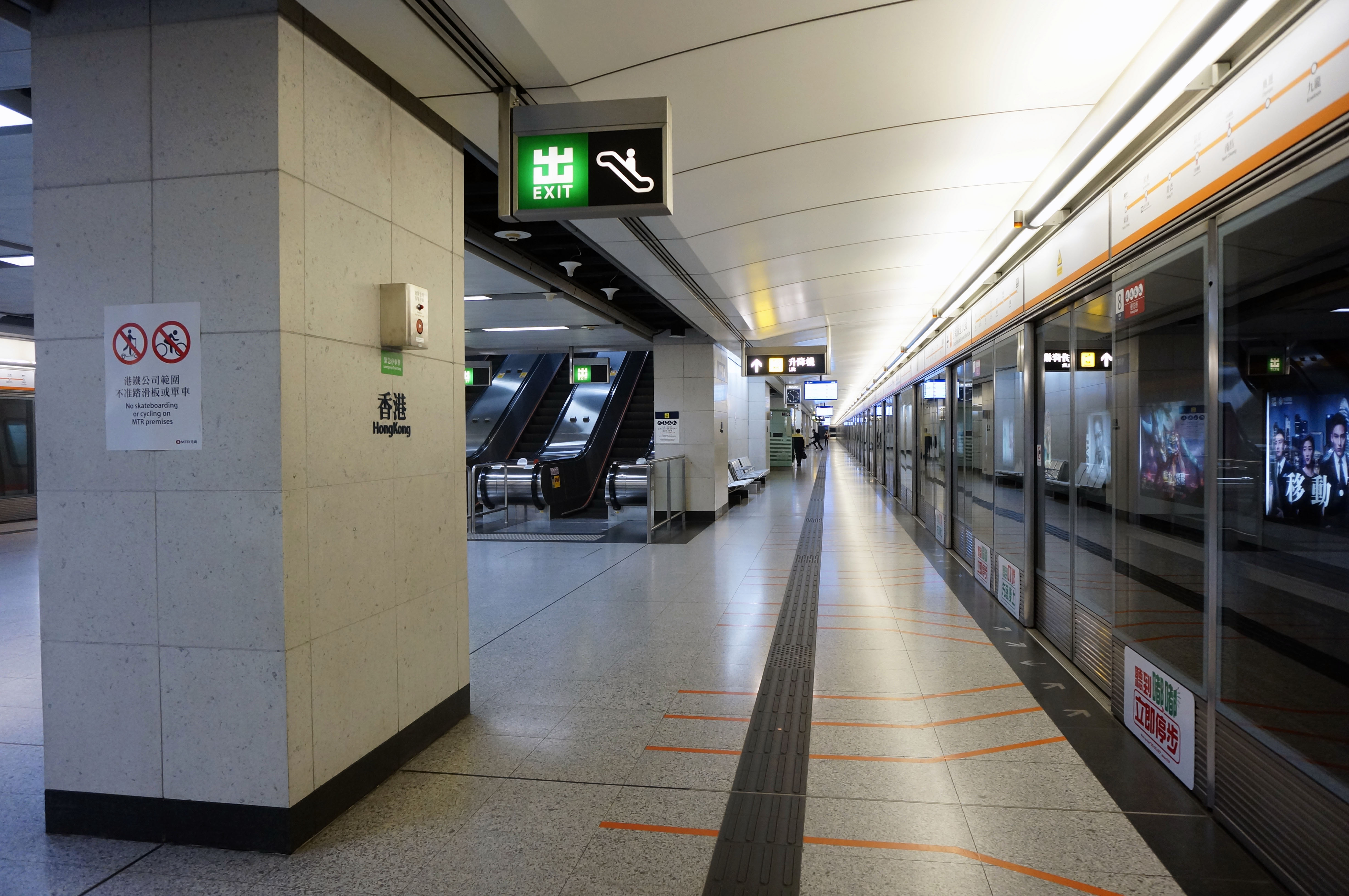 港鐵香港站月台